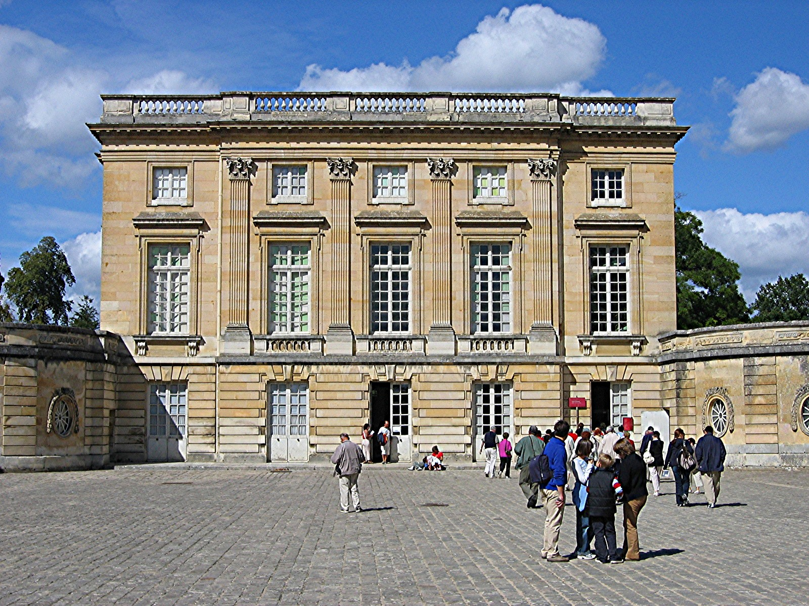 Château du Petit Trianon, parc de Versailles, photographie personnelle prise par l'utilisateur Urban en septembre 2004, GFDL (entrée sud)